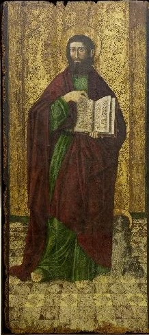 La obra representa al evangelista San Marcos, autor del Evangelio de San Marcos.